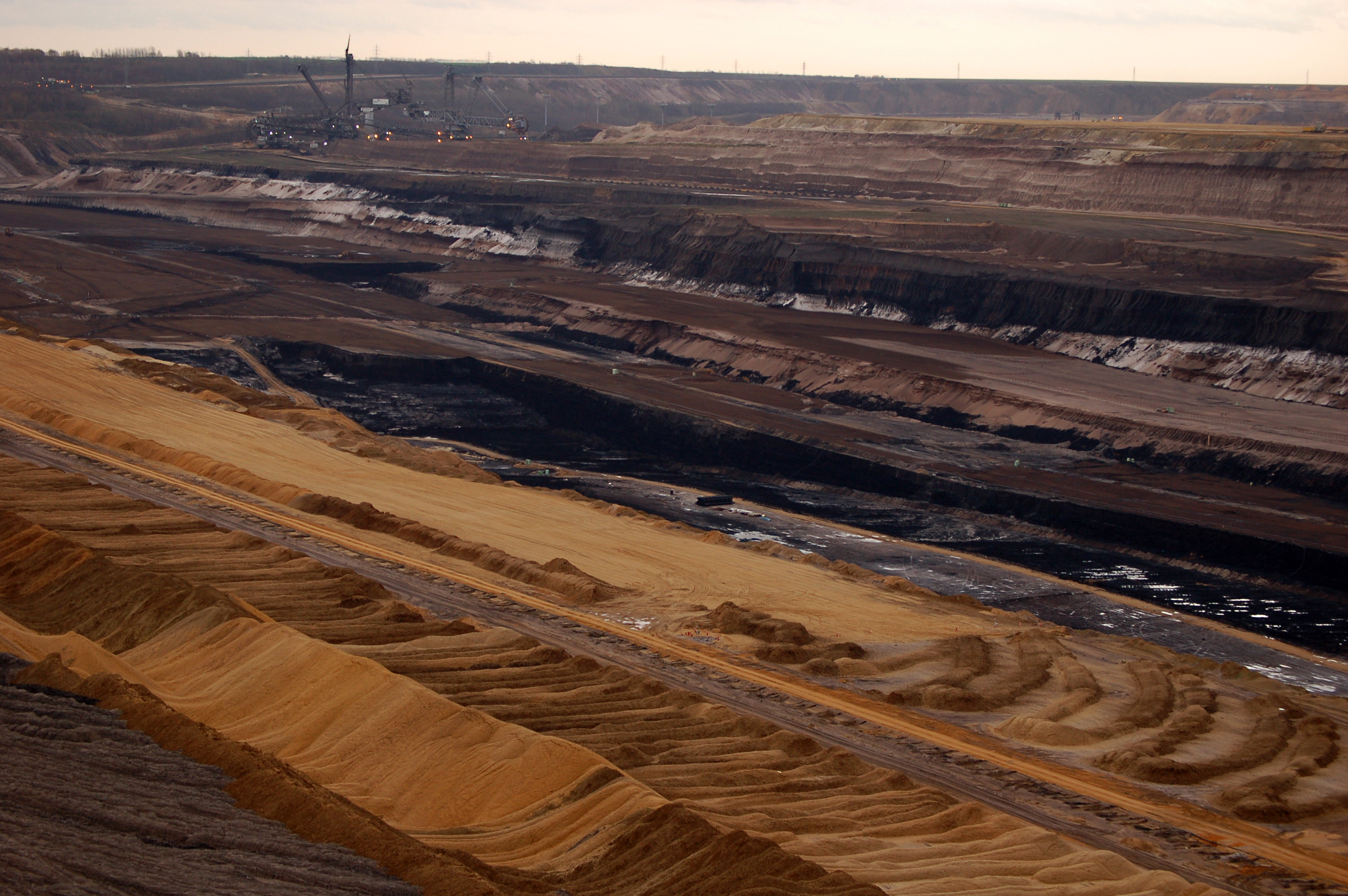 Braunkohletagebau Garzweiler im Herbst 2006